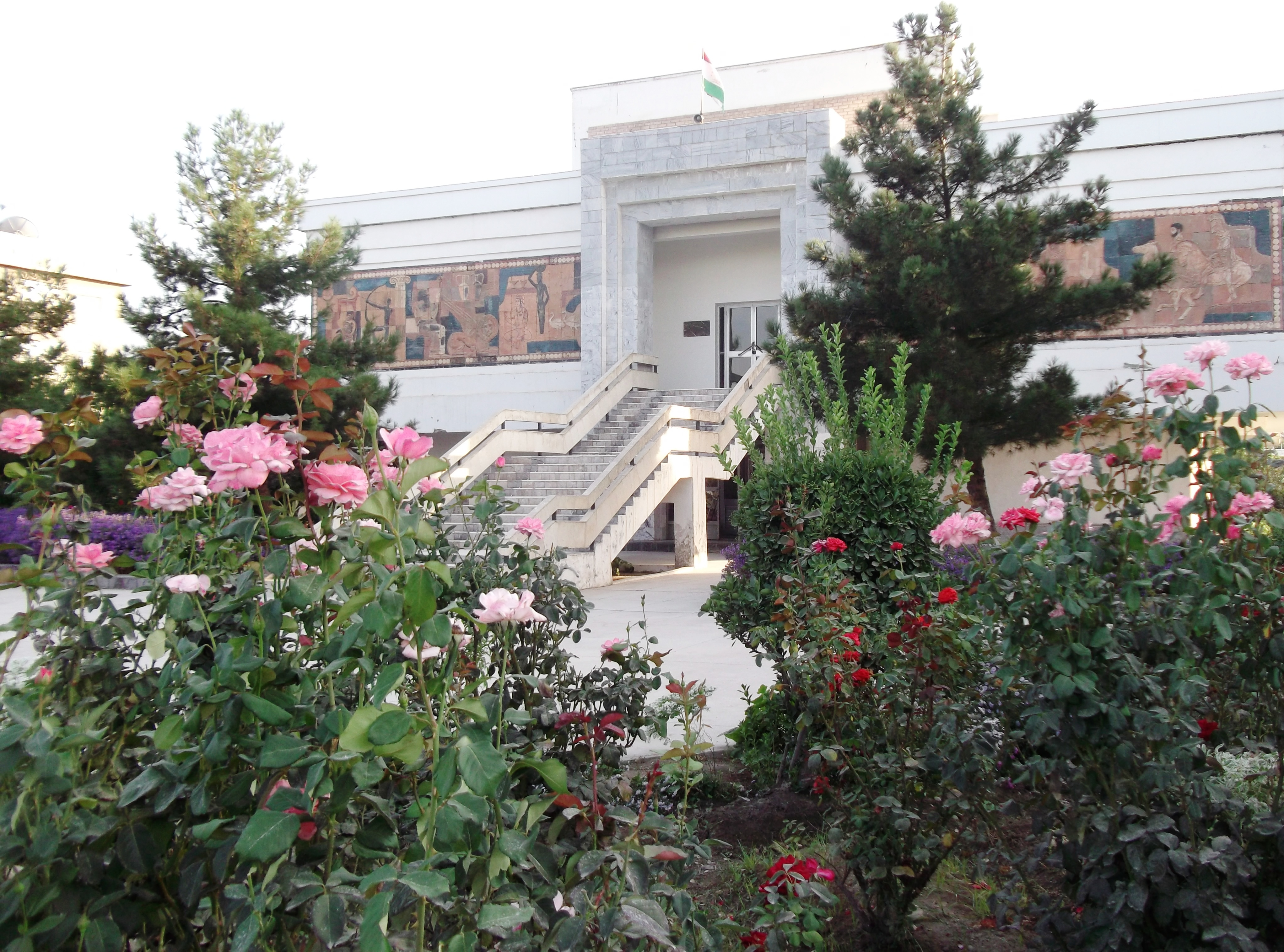 Музей академика Бободжана Гафурова, г. Гафуров, Таджикистан